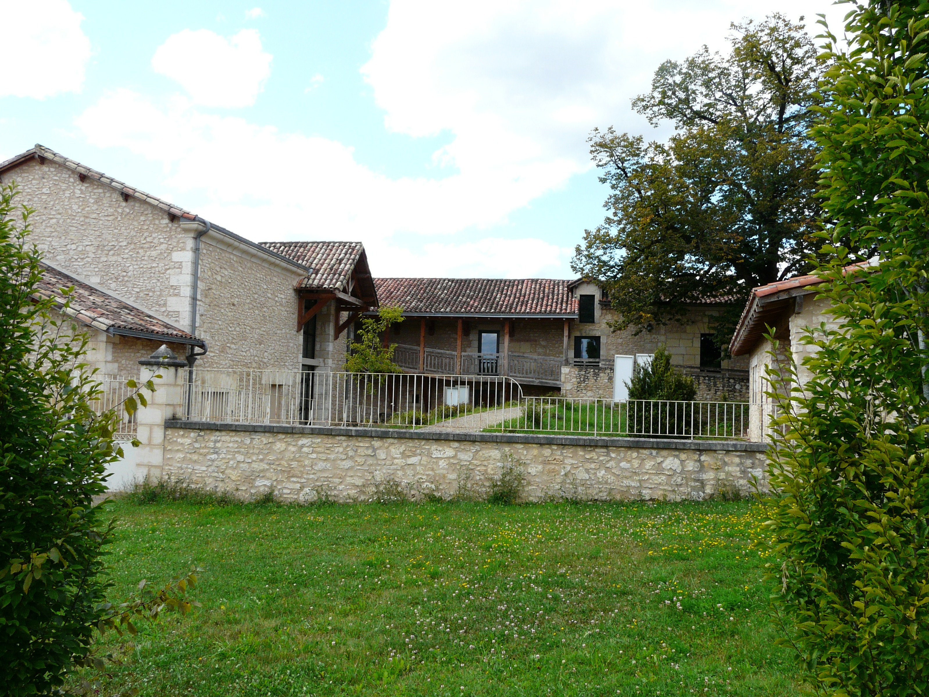 L'écomusée de la truffe (ancien siège de la communauté de communes des Villages truffiers des portes de Périgueux), Sorges, Dordogne, France.